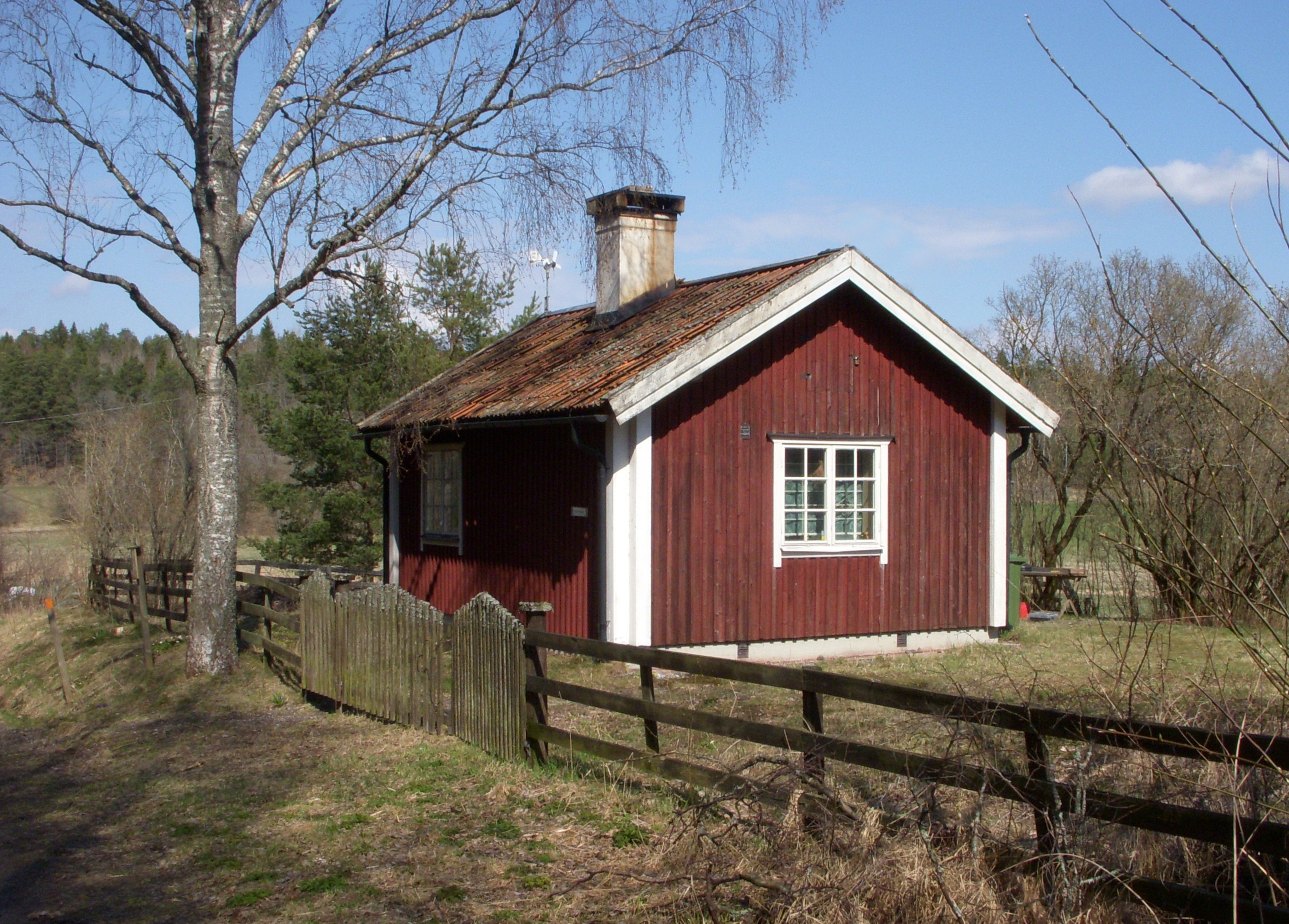 Båtmanstorpet Hanestorp